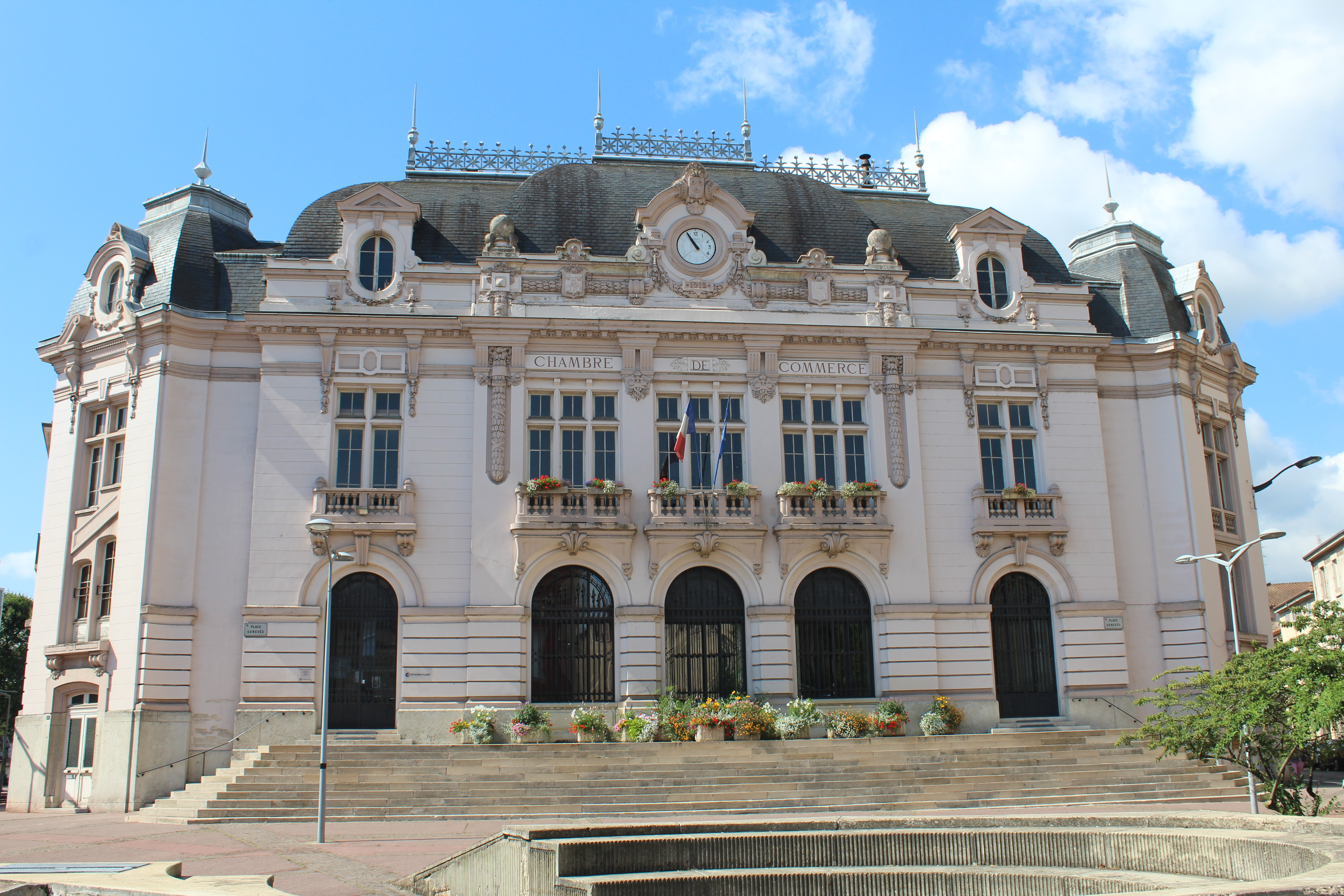 Chambre de commerce de Mâcon.